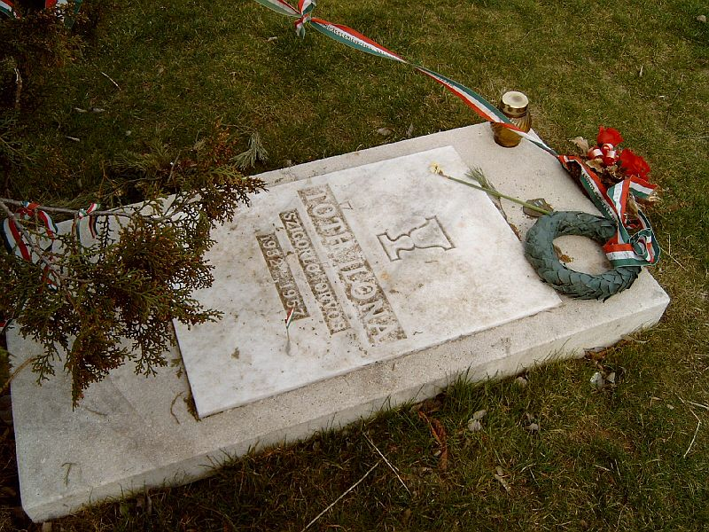 Tóth Ilona sírja Budapesten. Új köztemető: 301.